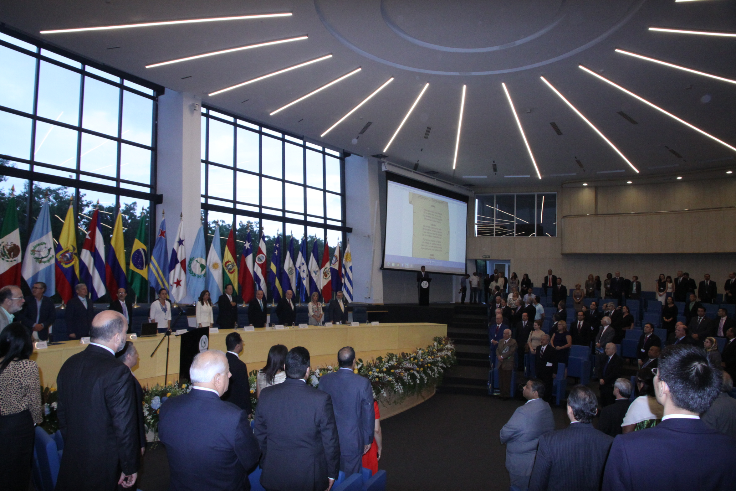 Fotografía: Hugo Ortiz / Asamblea Nacional Tema: La presidenta de la Legislatura, Gabriela Rivadeneira, en la Asamblea Conmemorativa del 50 aniversario del Parlamento Latinoamericano Boletín de prensa